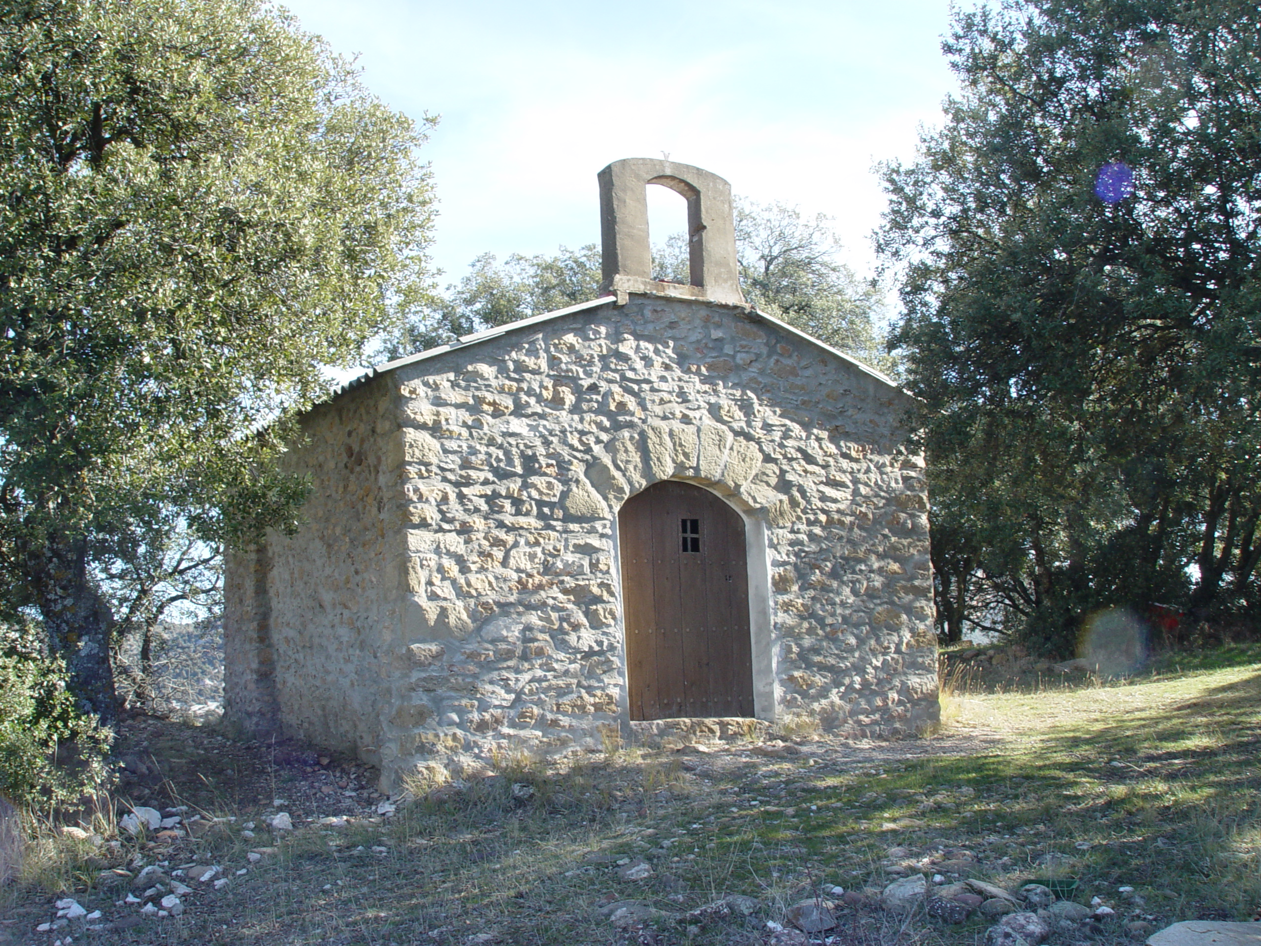 Ermita de Sant Antoni de la Cerulla de la Ribagorça